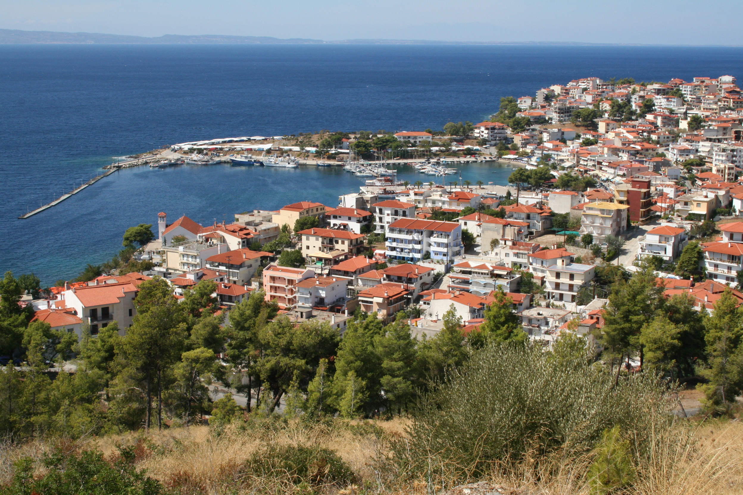 Blick auf Néos Marmarás